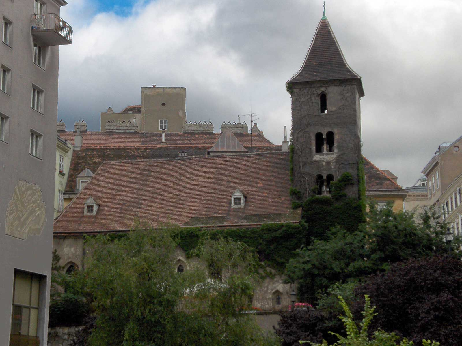 Ruprechtskirche, Innere Stadt, Wien (Vienna), Austria